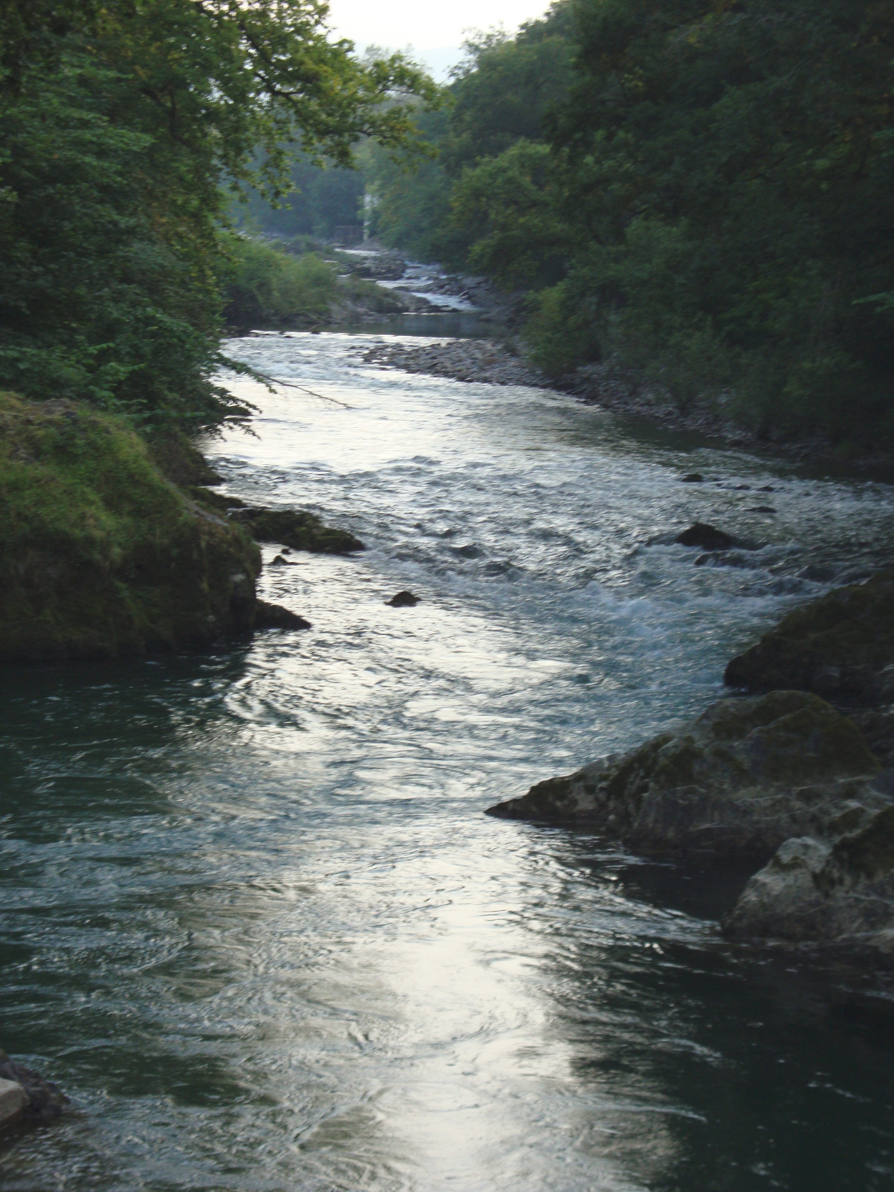 Libarrenx, quartier Arosemborde (Gotein-Libarrenx, Pyr-At, Fr) la Saison dans la lumière du soir.